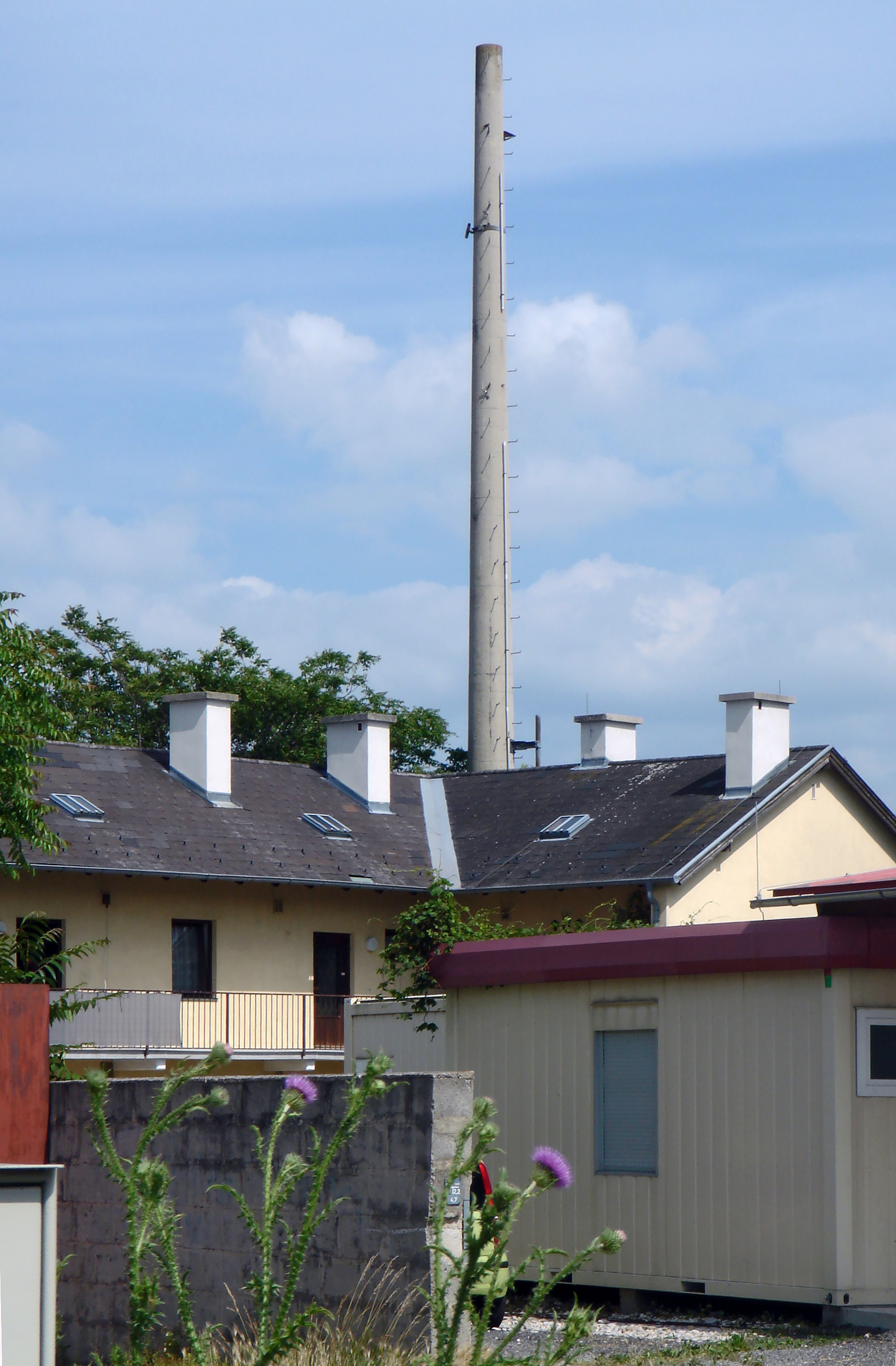 Baden bei Wien, Haidhofstraße 91, ehemaliger Richtfunk-Empfangsmast der Kabelsignal-Gesellschaft